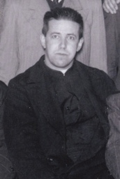 Padre Alberto Hurtado.